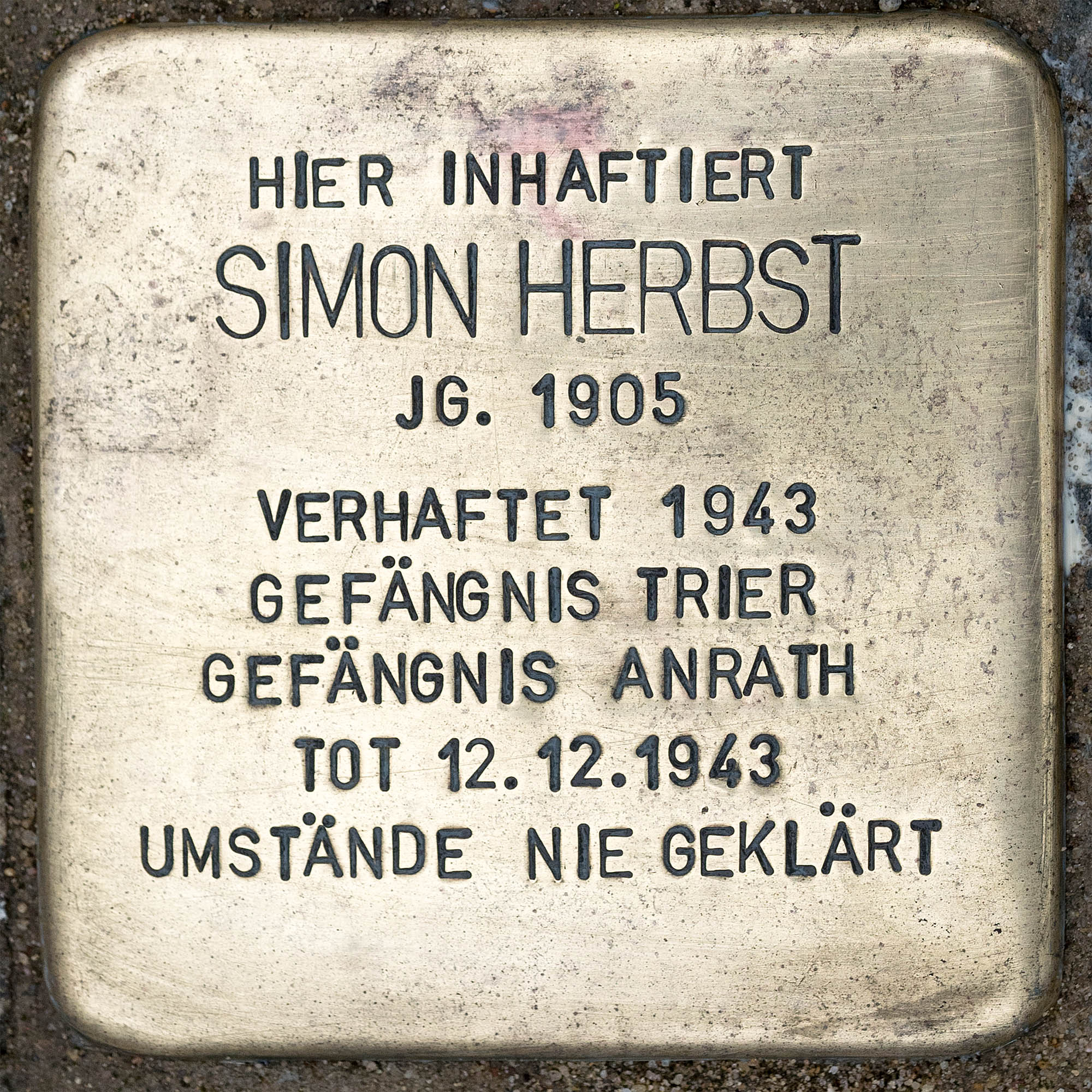 Stolperstein für Herbst, Simon